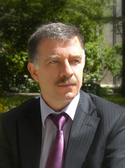 Yazar Muhammed Bozdağ